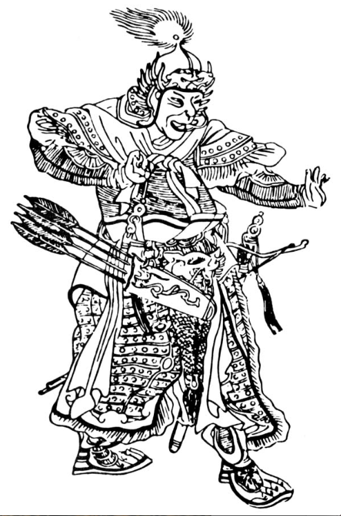 Medeltida kinesisk teckning av Tsubodai